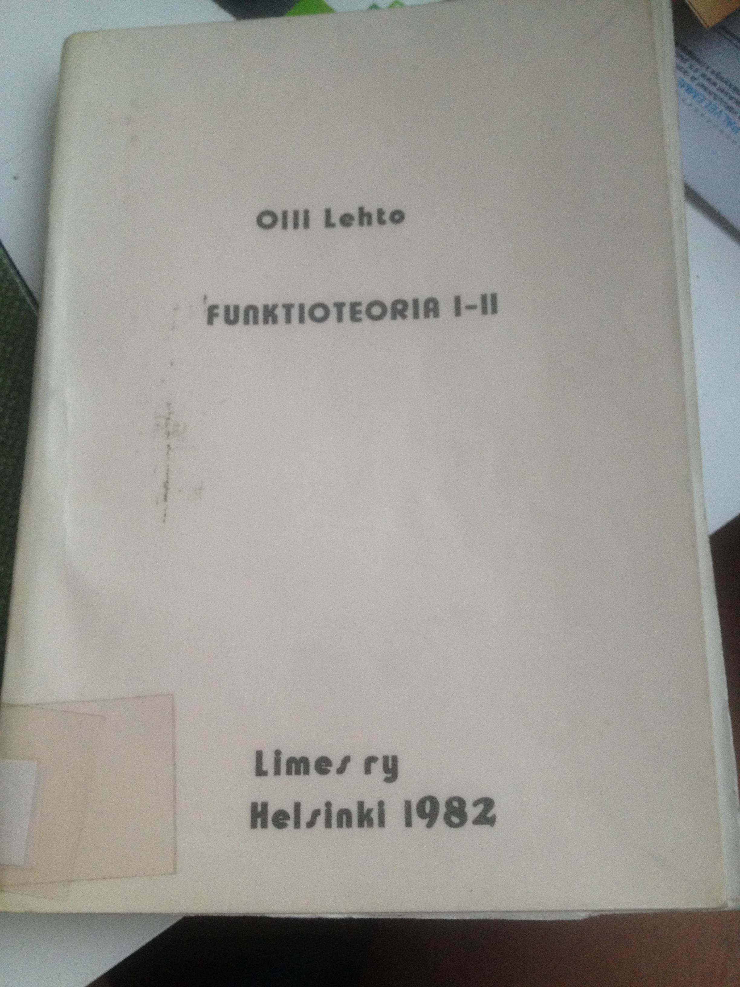 Kuva Olli Lehdon kirjasta Funktioteoria I-II.